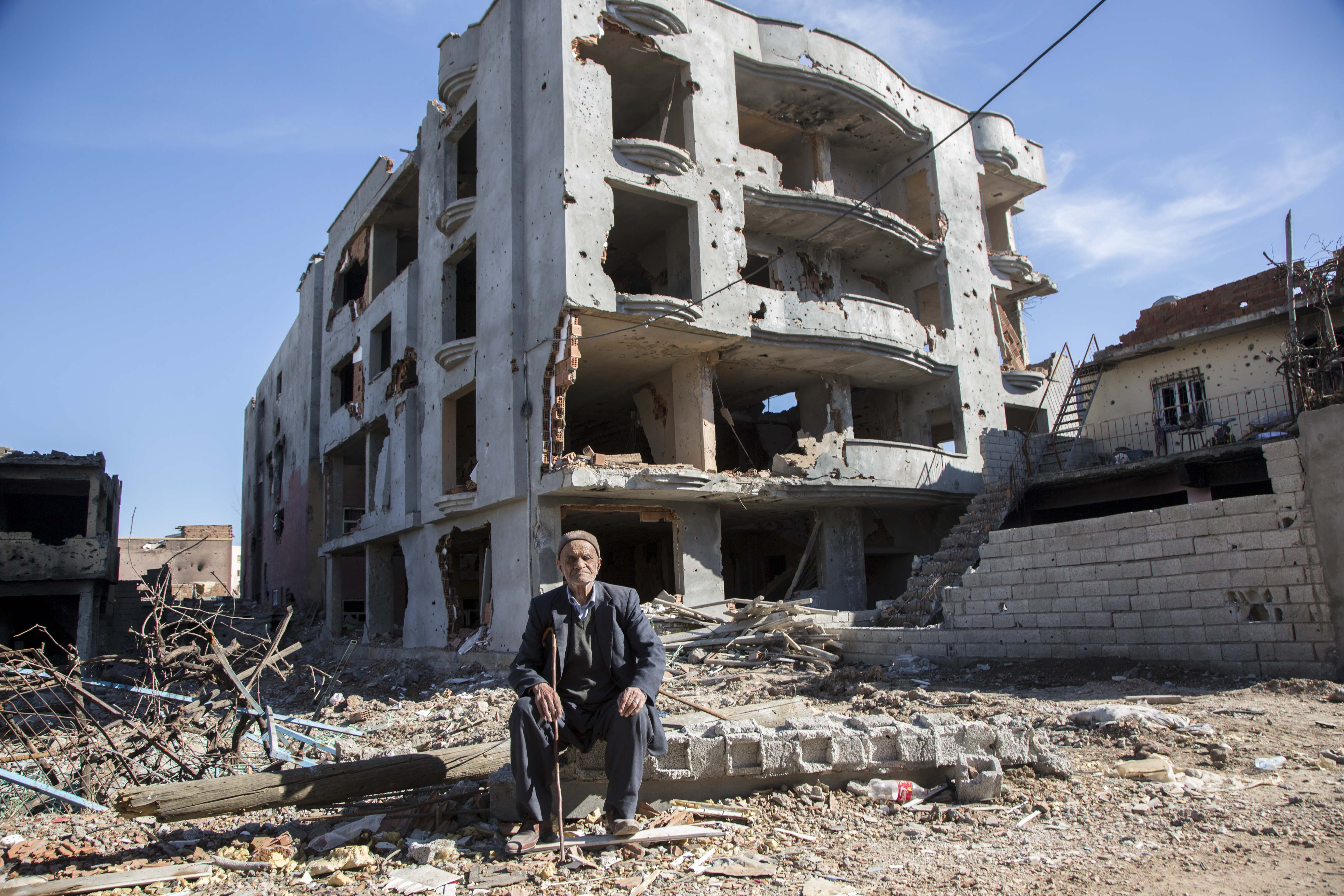 Cizre çatışmaları sırasında hasar gören bina ve bir Cizreli, 2 Mart 2016